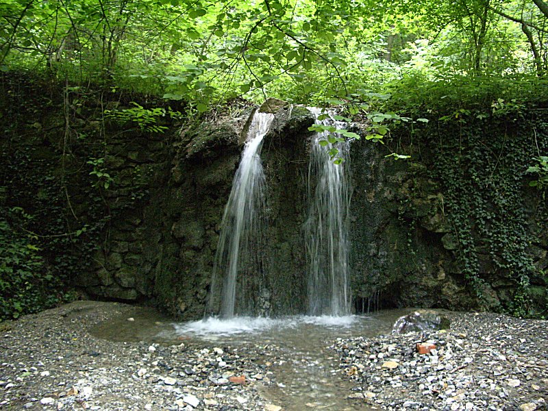 Автор на снимката е Ивайло Писков.